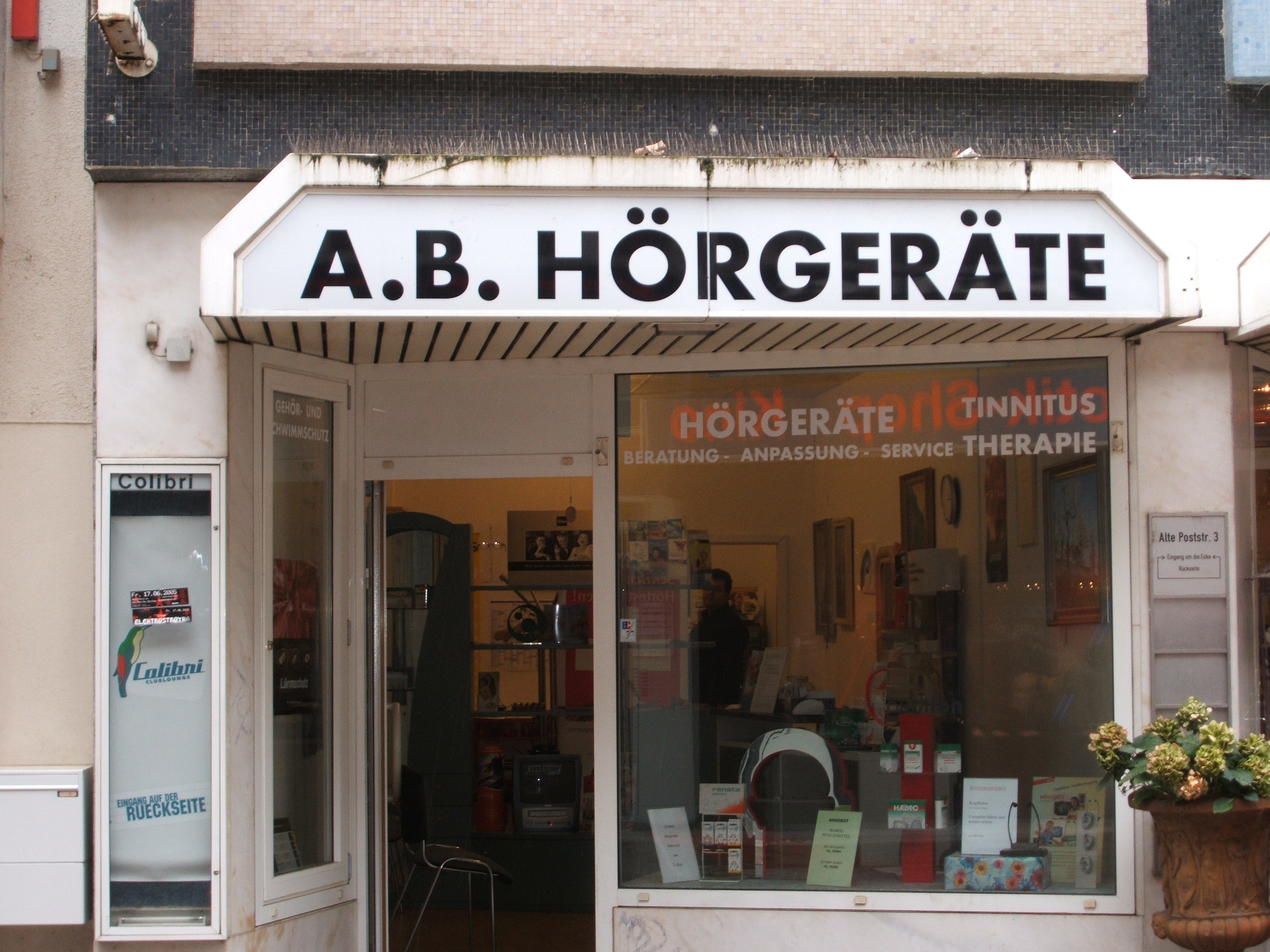 Abhörgeräte Stuttgart 2005.